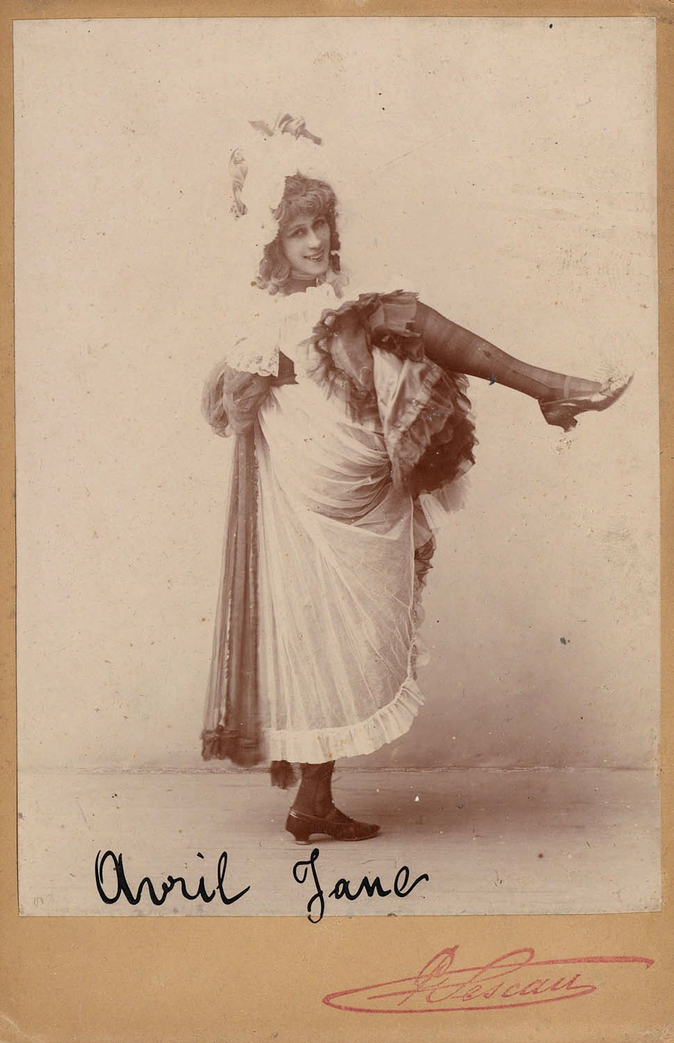 Jane Avril sur une photo de Paul Sescau (1858-1926). Vers 1890.